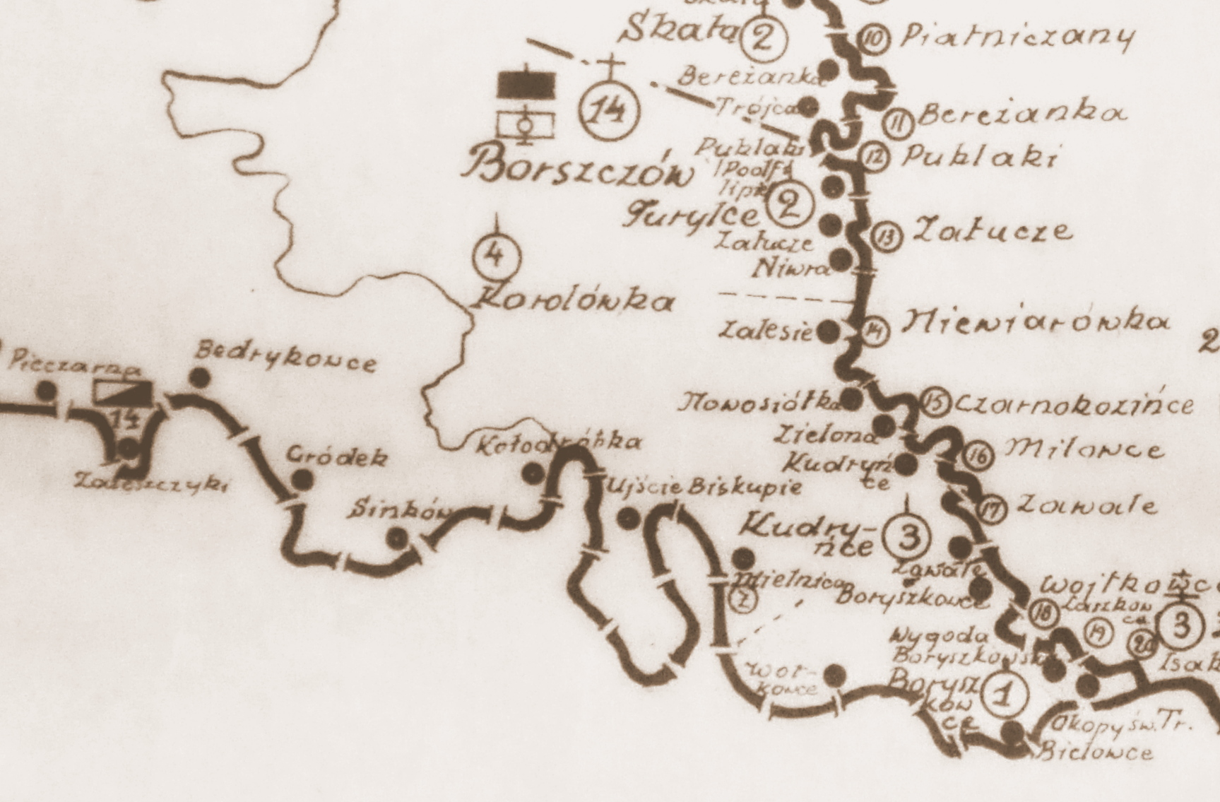 Szkic rozmieszczenia batalionu KOP Borszczów w 1931